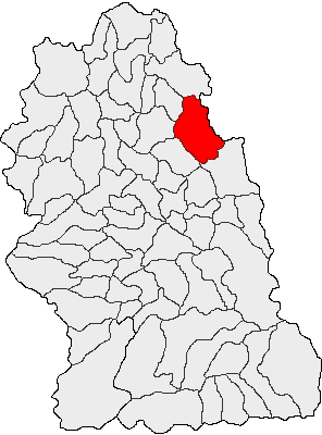 Categorie:Hărţi ale judeţului Hunedoara